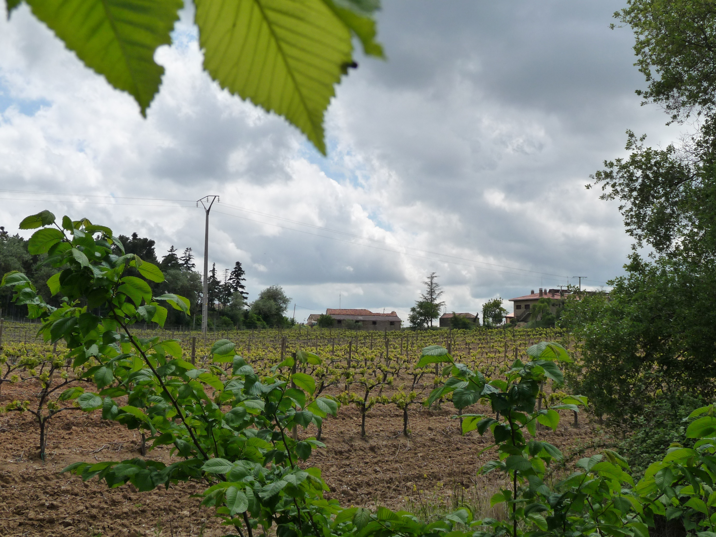 Finca de Ternero, Burgos (España)